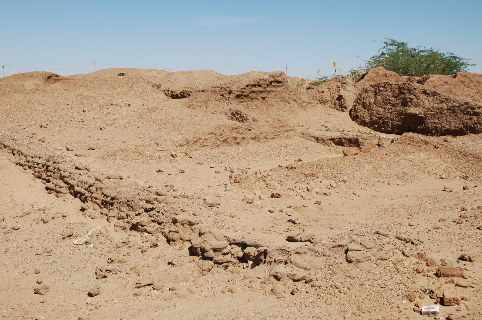 Sudan, Soba, Reste ungebrannter Lehmziegelmauern